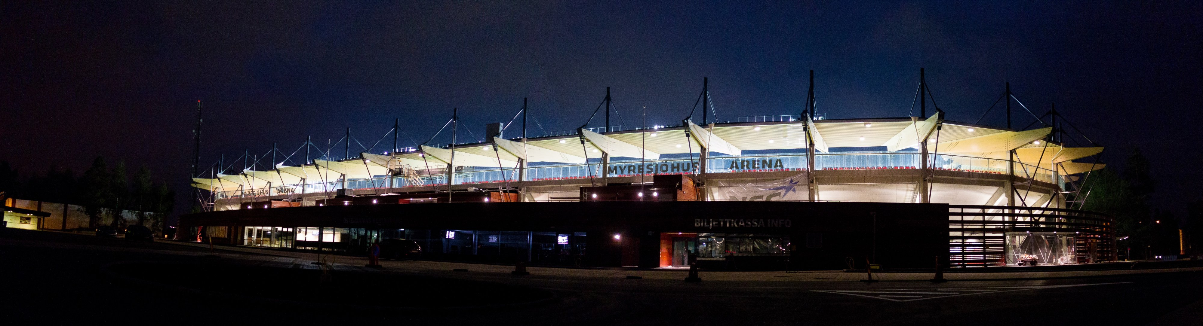 Myresjöhus Arena från västra sidan, upplyst på kvällen 30/8 2012 efter första träningen inne på arenan.